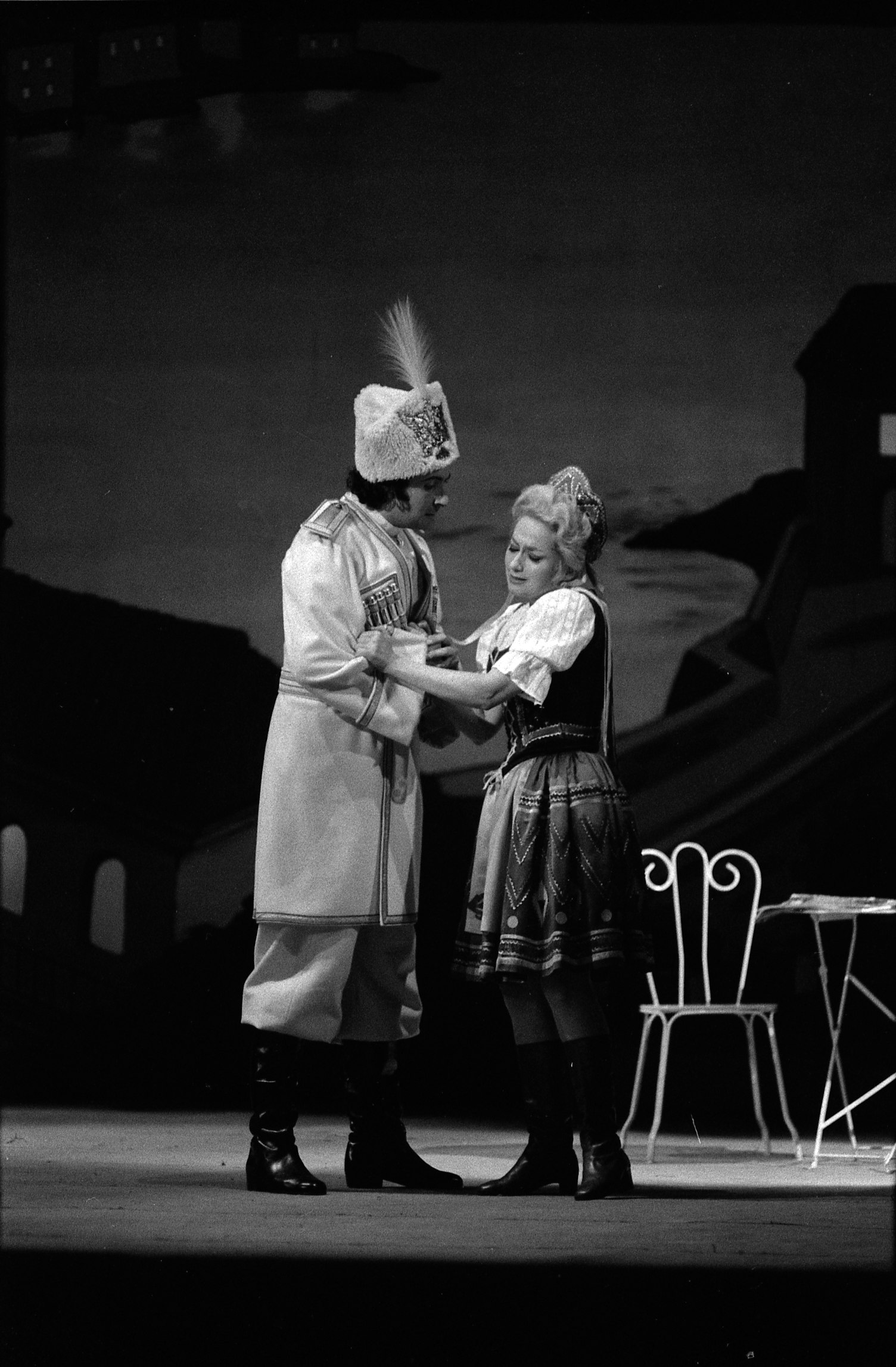 Théâtre du Capitole. Le 22 Févier 1973. Vue de la représentation de Tzarevitch au théâtre du Capitole.